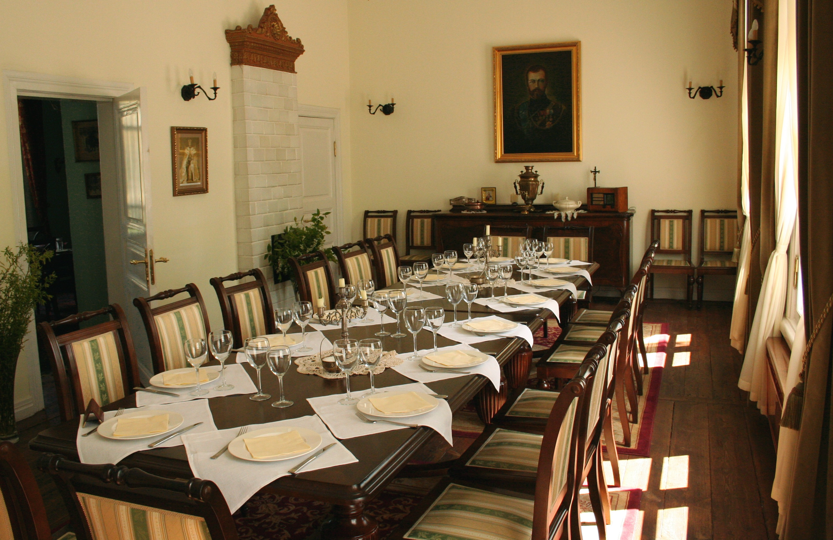 "restauracja Carska" (wnętrze) w Białowieży